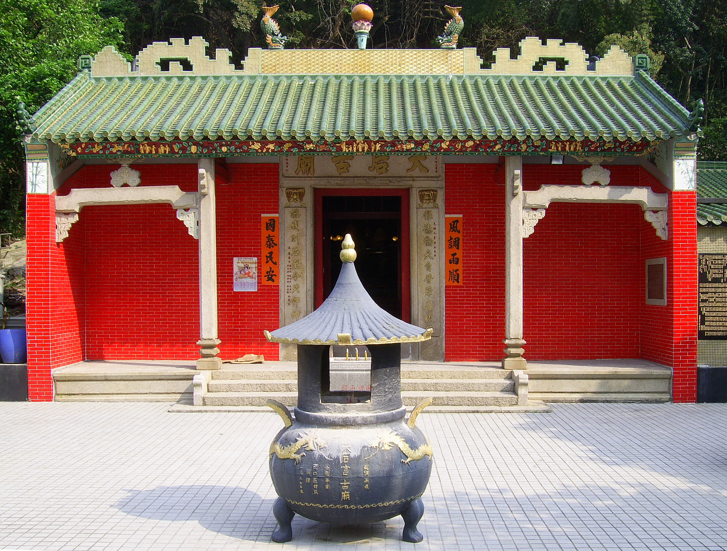 中文（香港）: 坑口天后廟